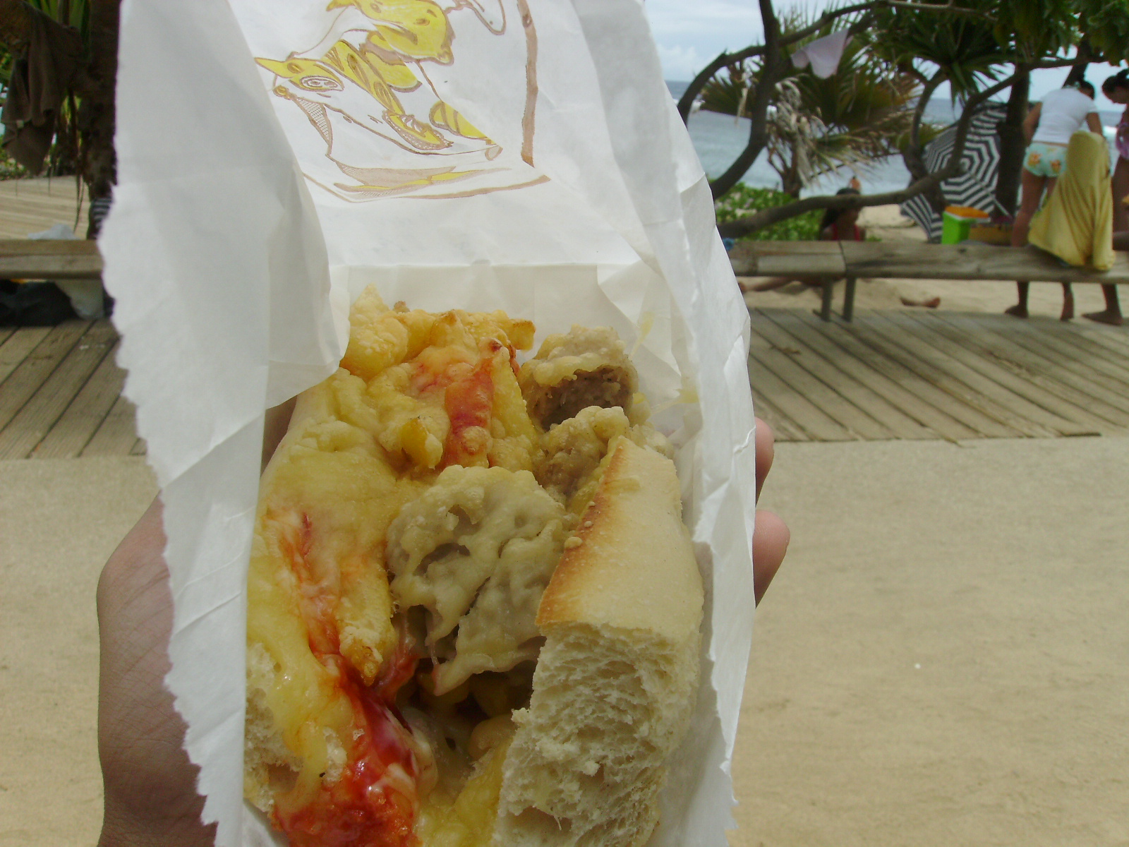 Photo d'un pain bouchon vendu à la Réunion